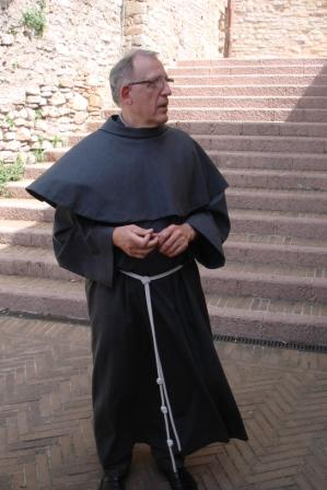 Bror Theodor i Assisi maj 2009